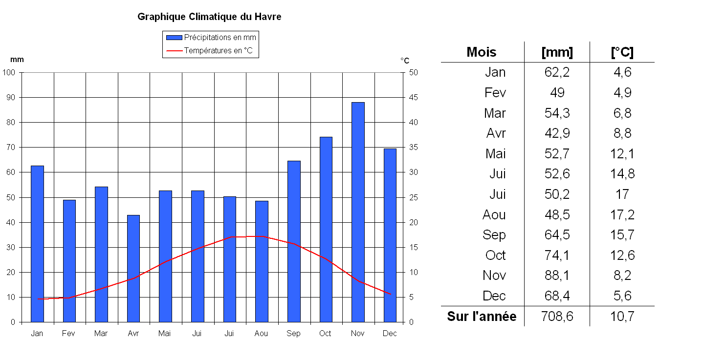 Diagramme climatique du Havre